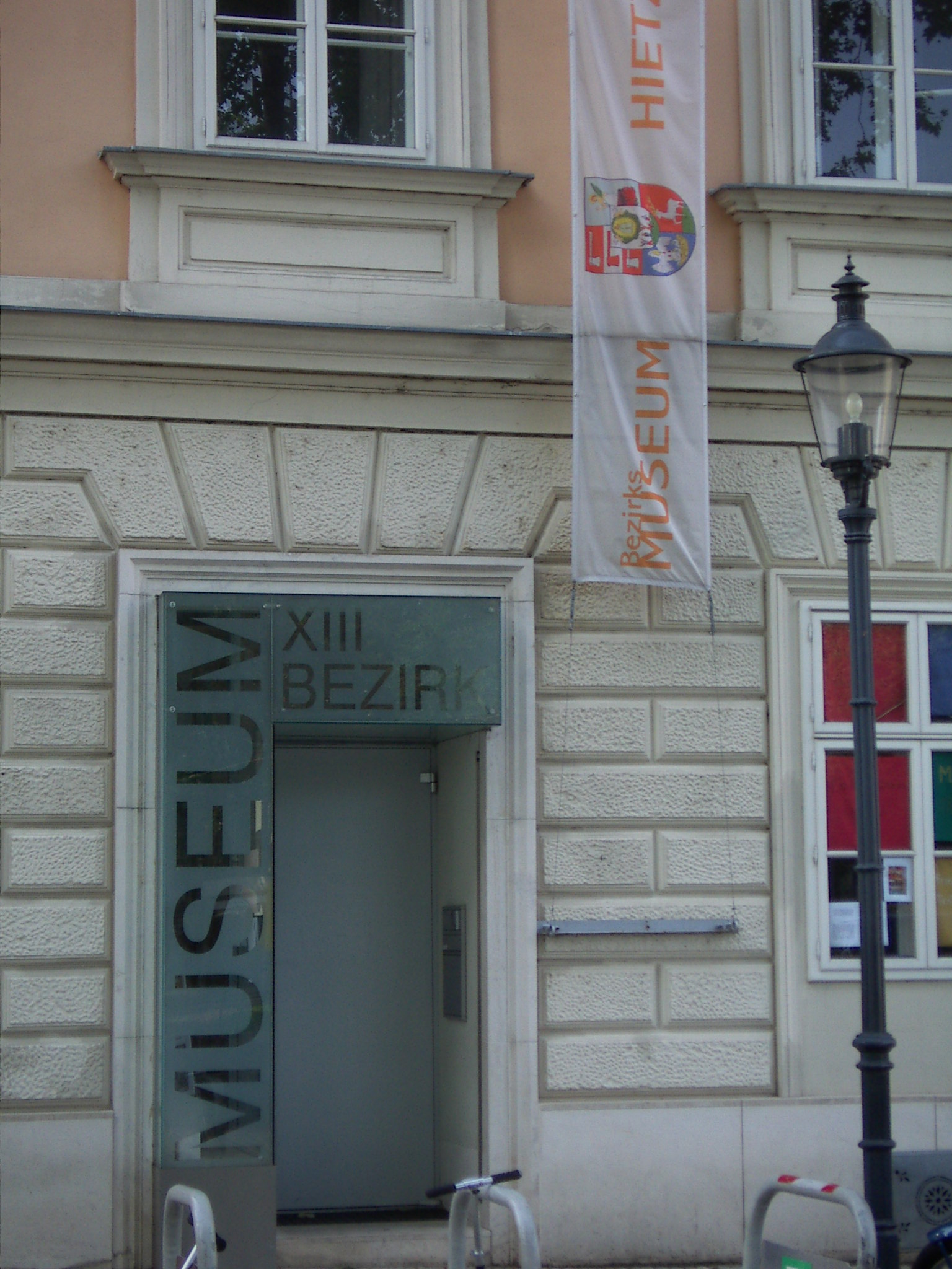 Bezirksmuseum Hietzing, Eingangsbereich